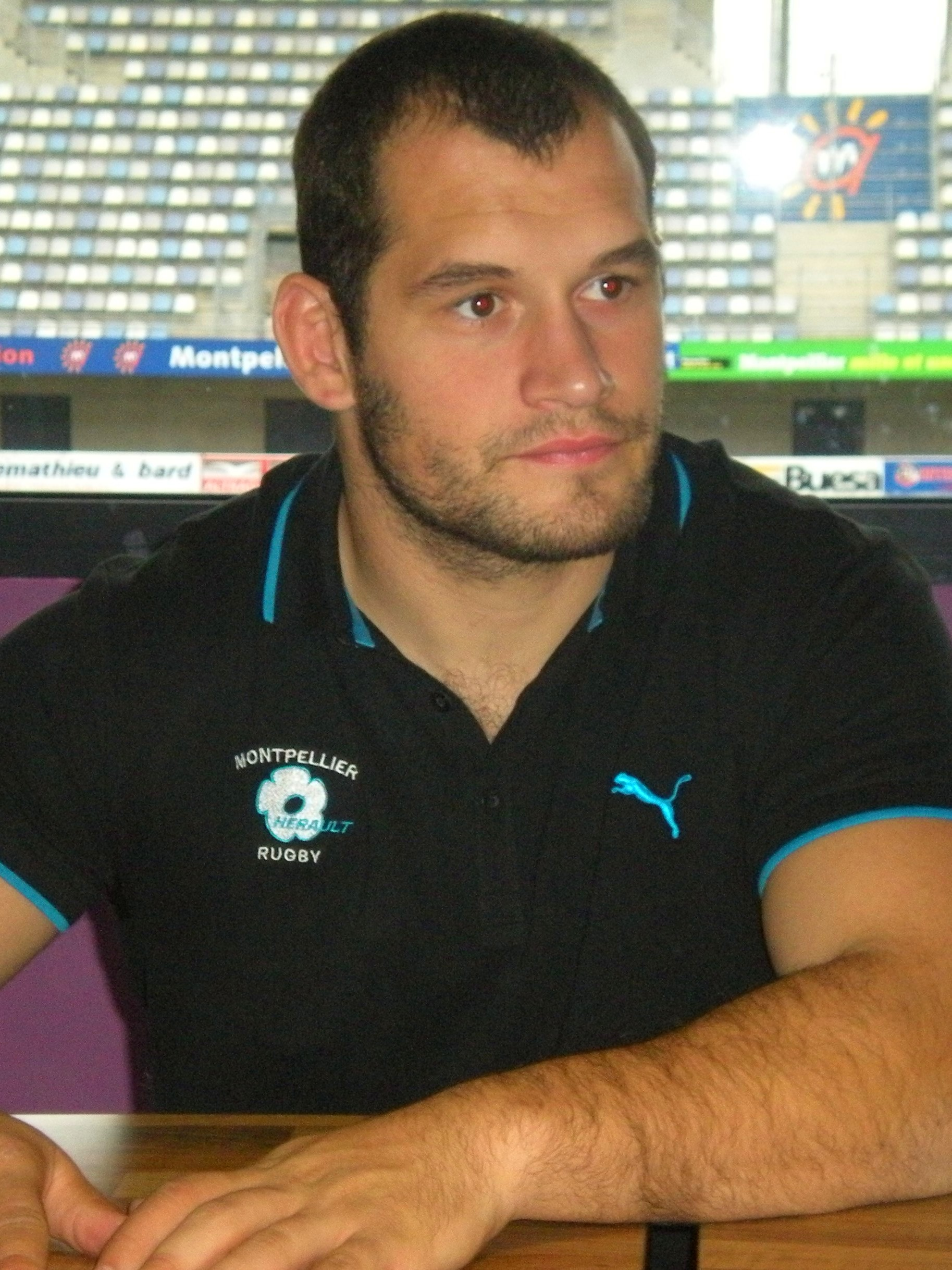 Charles Géli (décembre 2012).